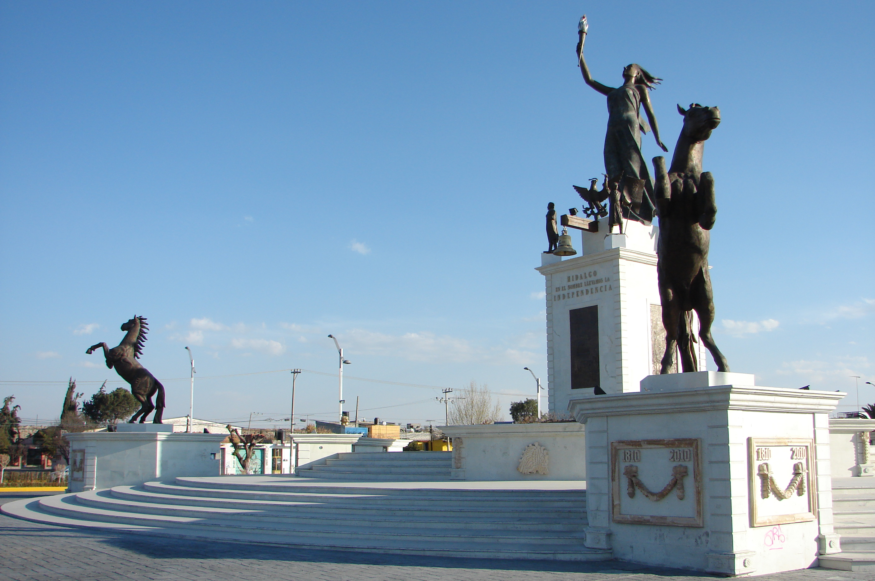 Escultura conmemorativa del bicentenario de la independencia de México